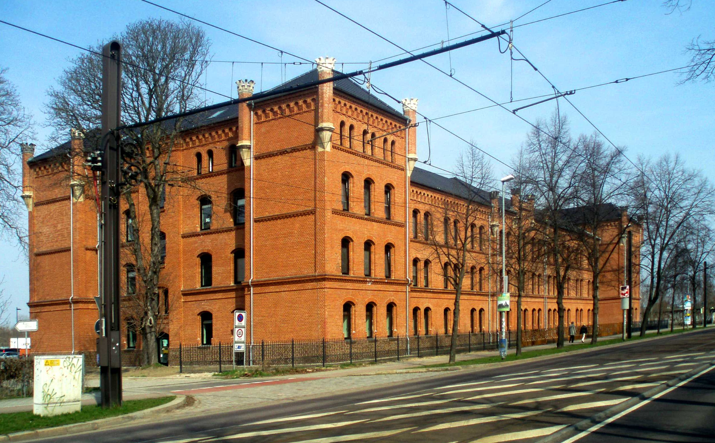 Landeshauptarchiv Sachsen-Anhalt in Magdeburg